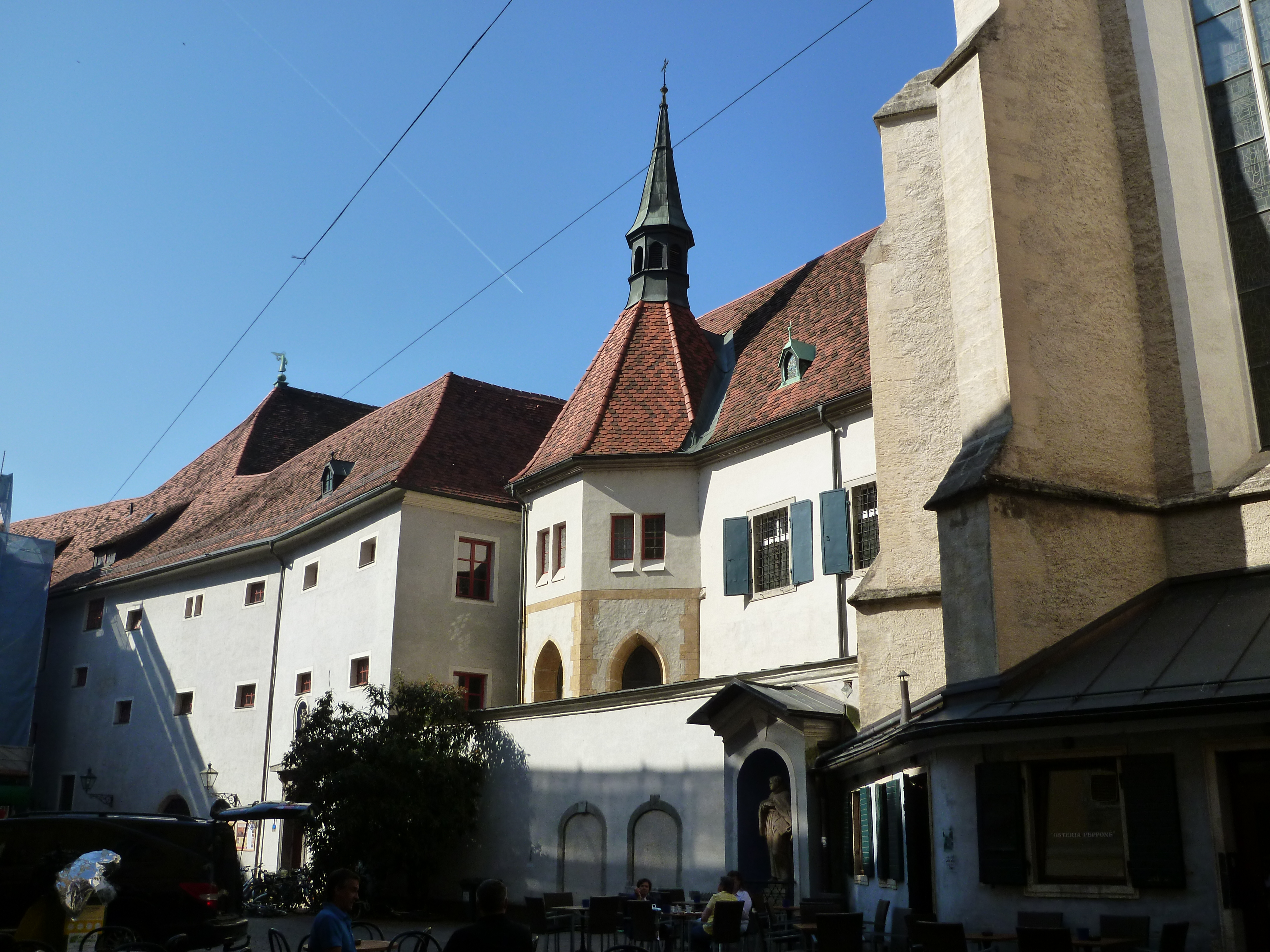 Franziskanerkloster (Ostseite, Eingang besonnt) mit Teil der Stadtmauer mit Zwinger, Franziskanerkirche mit angebauten Läden; Graz, Franziskanerplatz